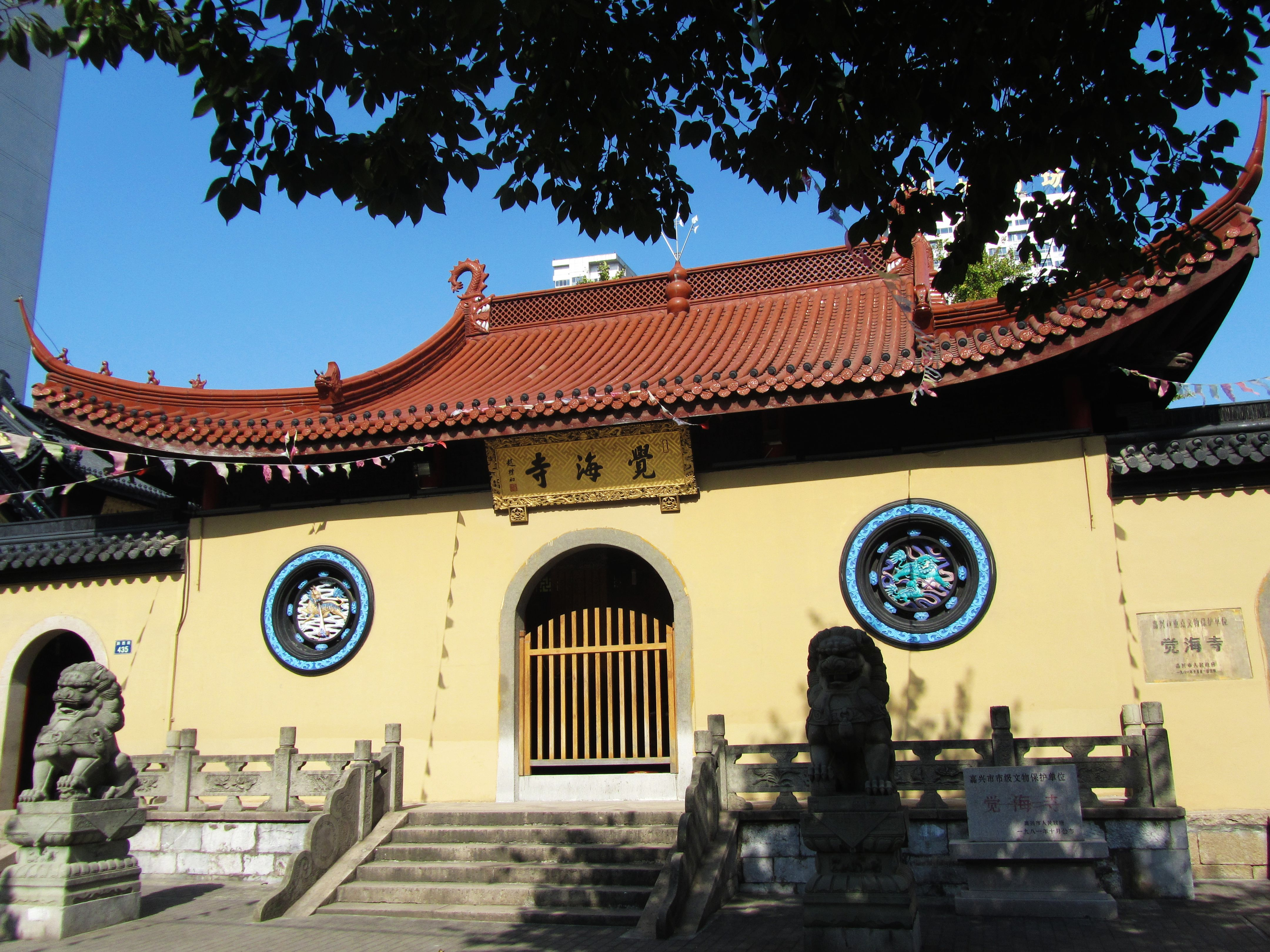 嘉兴觉海寺，山门侧面。